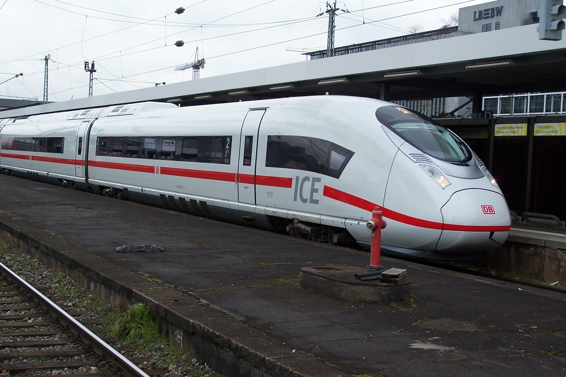 ICE 407 717 (Velaro D) in Stuttgart Hbf. Endwagen von vorn.